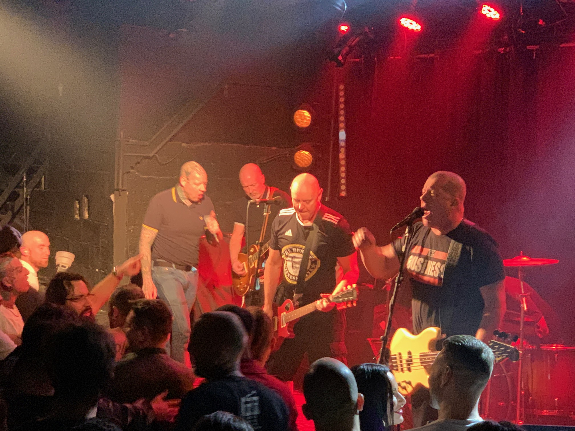 להקת מחווה ל-The Business בהופעה בתיאטרון תמונע בתל-אביב, 16 בינואר 2020. אני צילמתי את התמונה.